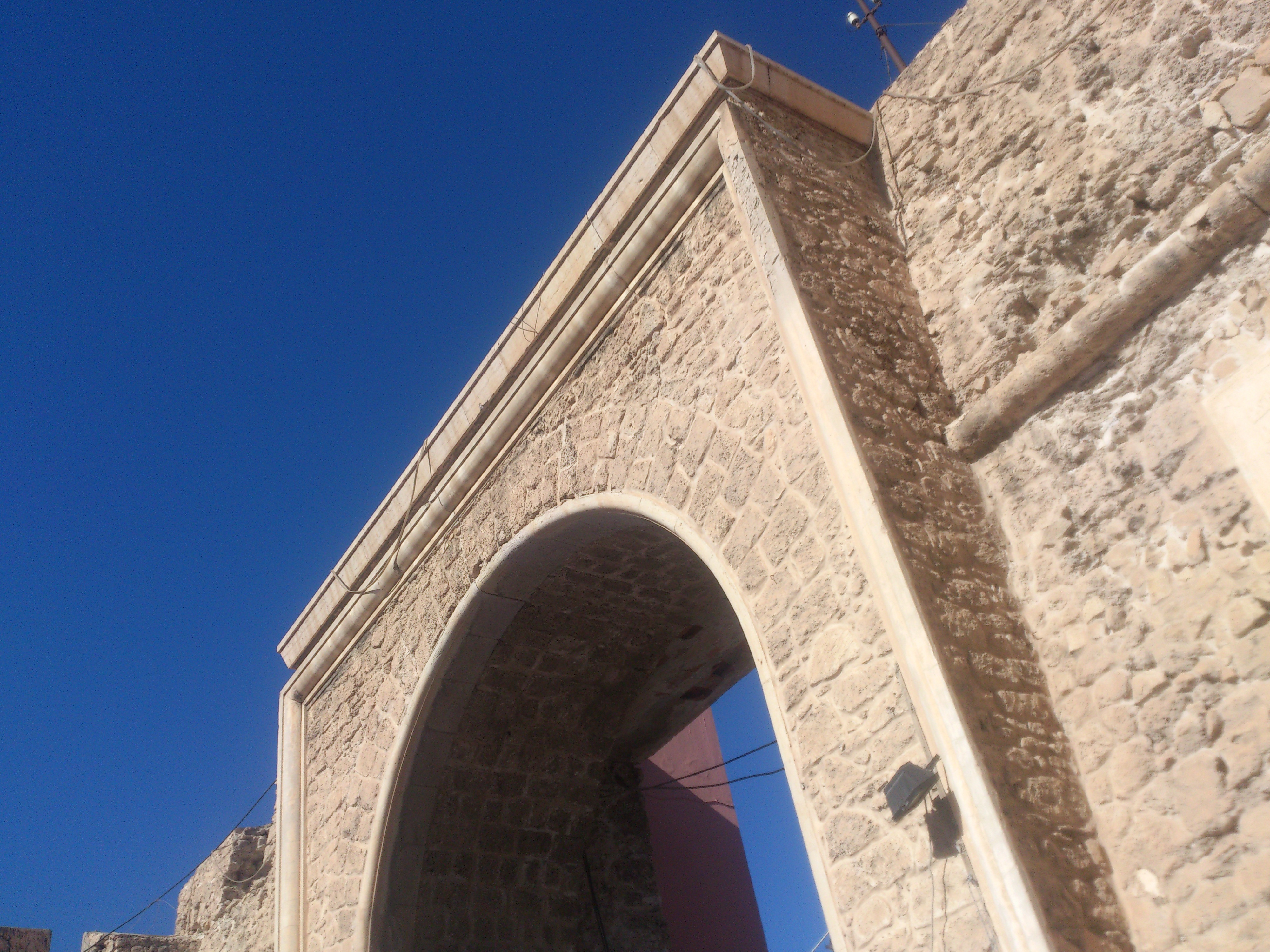 أحد أبواب قلعة طرابلس القديمة